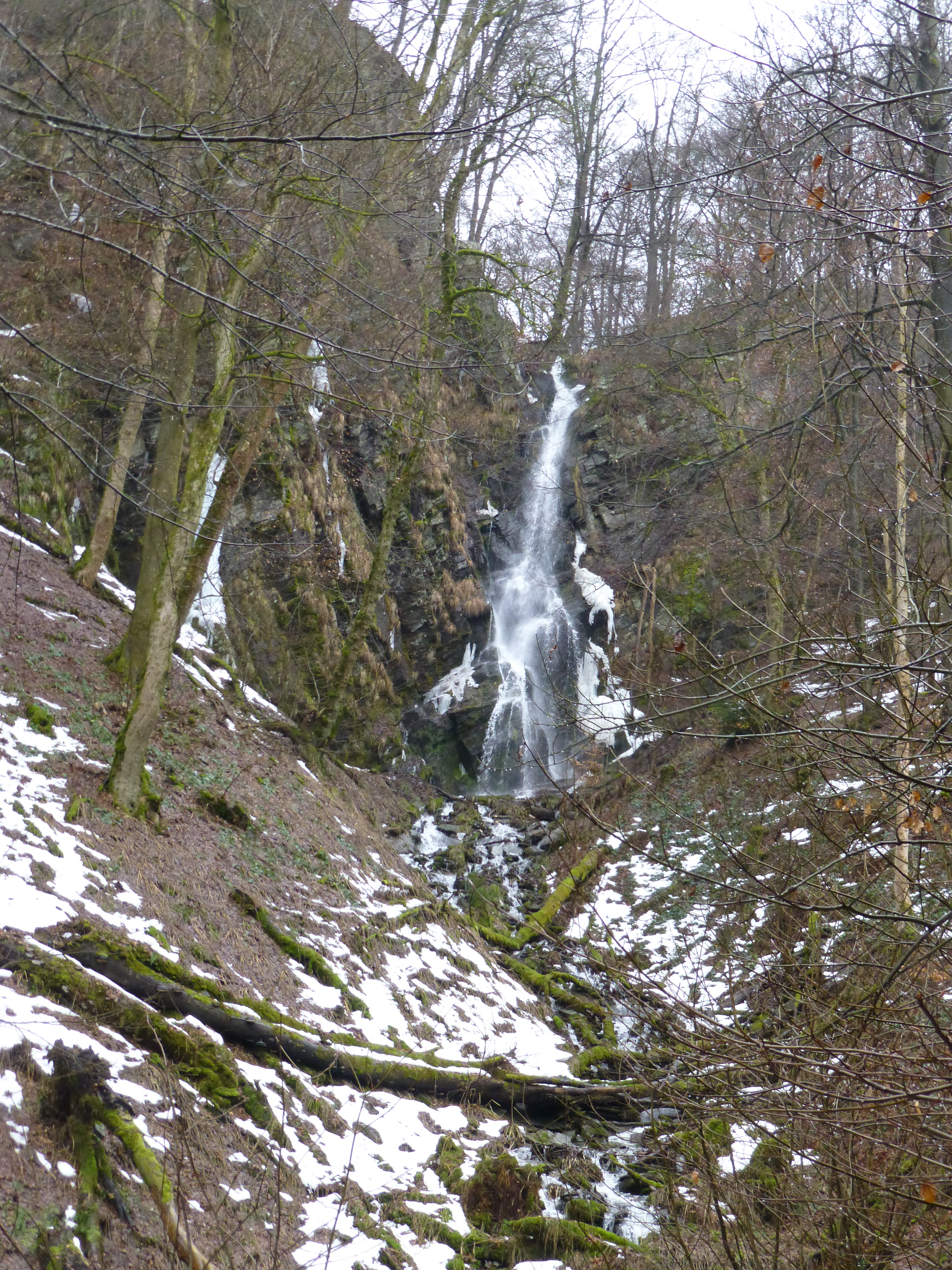 Wasserfall Plästerlegge im NSG Plästerlegge – Auf’m Kipp bei Bestwig-Wasserfall, Hochsauerlandkreis